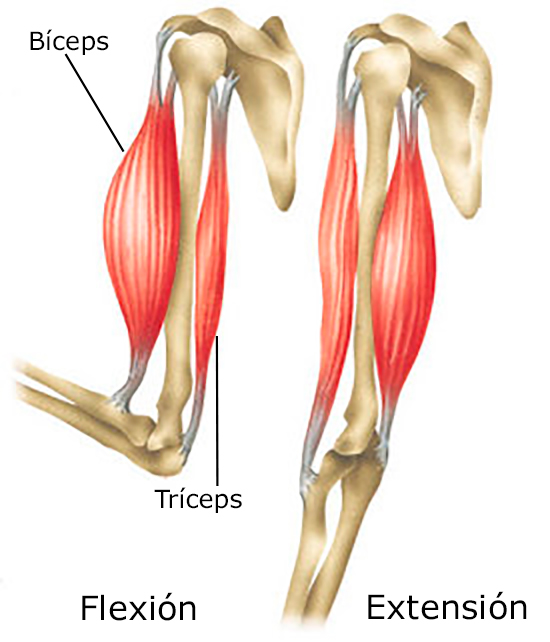 Esquema en el que se representan los músculos biceps y triceps con los movimientos de flexión y extensión. Rótulos en español.